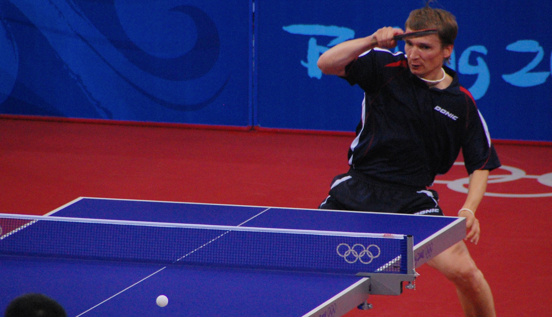 Werner Schlager from Austria